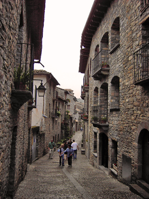 Calle Pequeña de Aínsa, en Sobrarbe, Huesca.